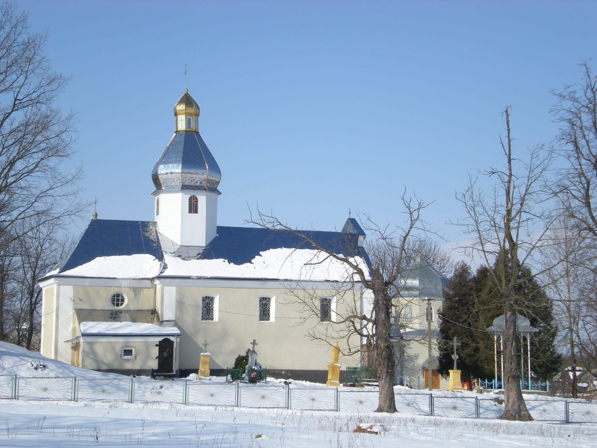 Hordynya, Lviv Oblast, Ukraine, 81466